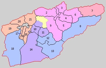 山梨県南都留郡の町村。